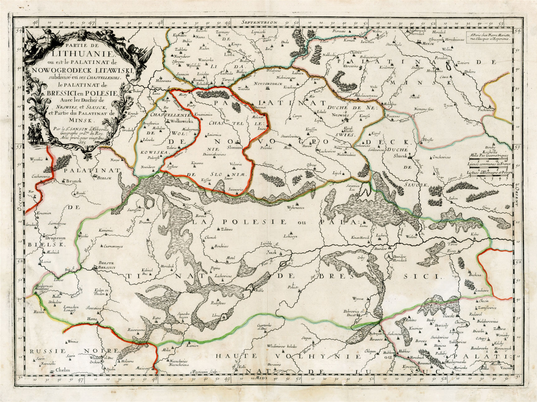 Беларуская (тарашкевіца): Мапа Наваградзкага (Navahradak) і Берасьцейскага (Bieraście) ваяводзтваў